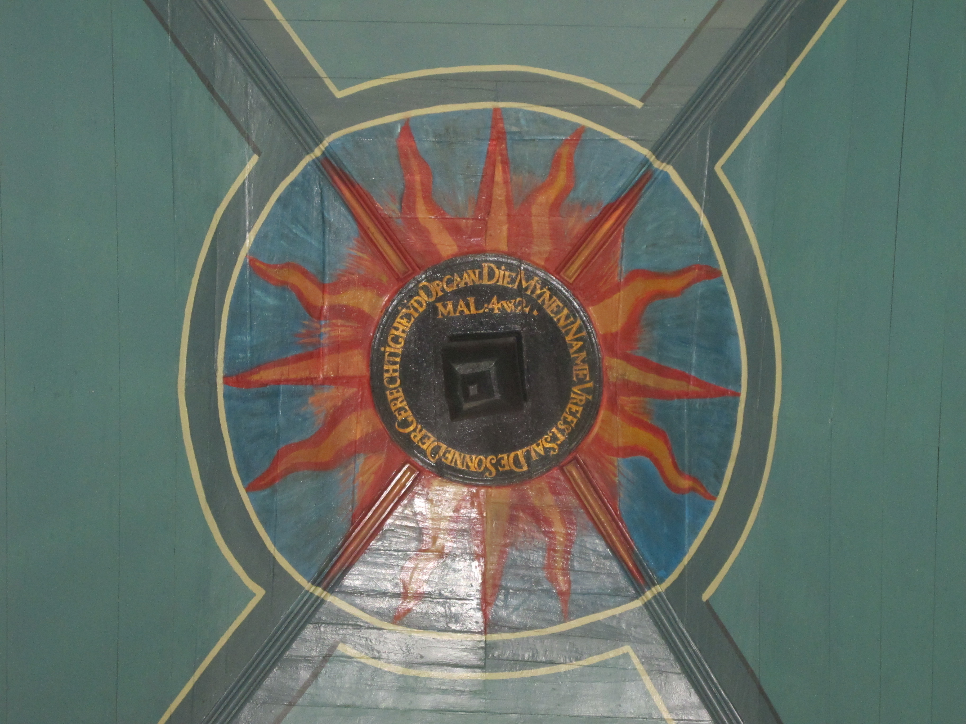 "Die Mynen Name Vreest, Sal De Sonne Der Gerechtigheyd Opgaan Mal:4v2" Schildering op boogplafond doopsgezinde kerk Winterswijk